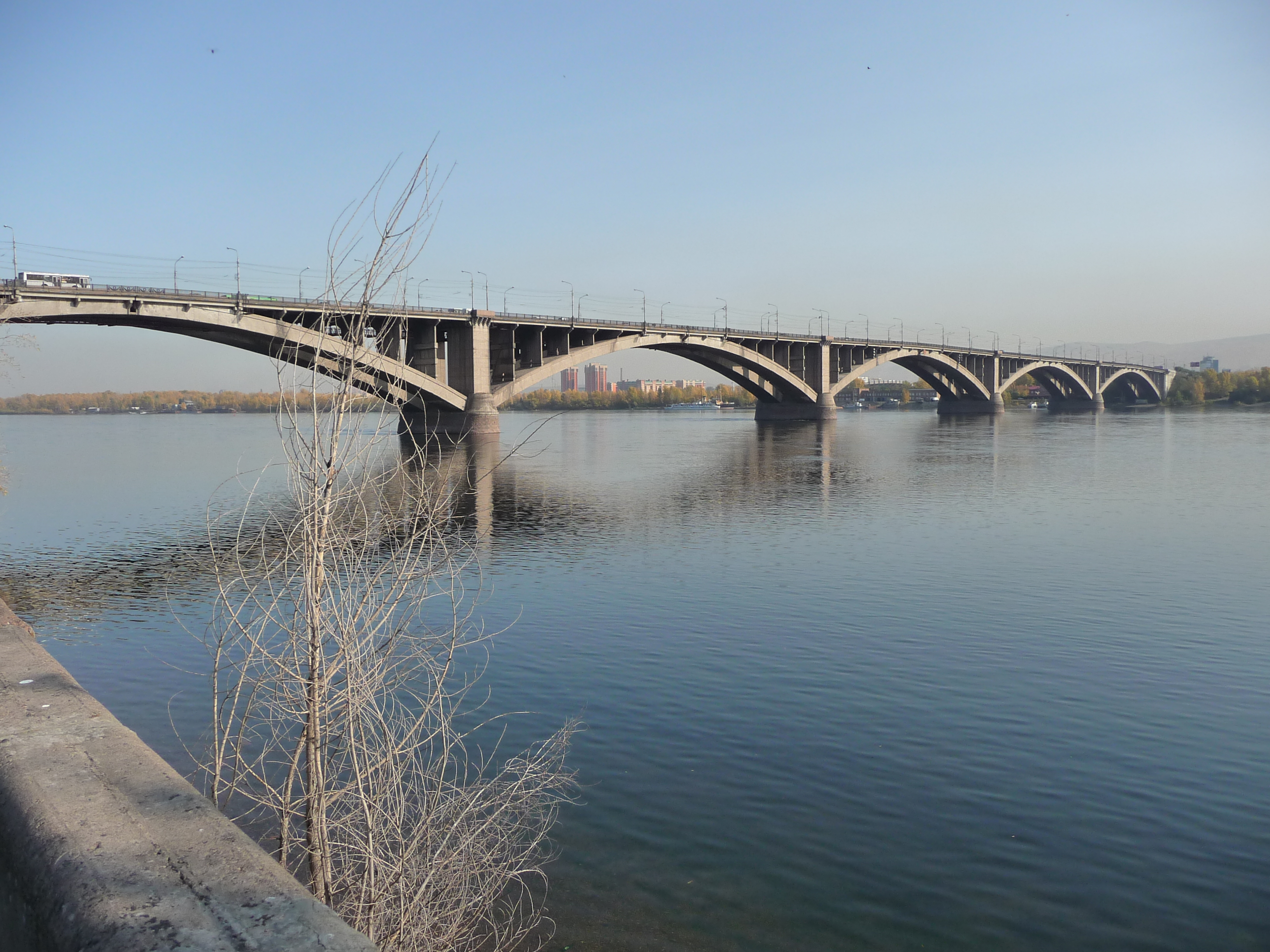 Kommunalny Bridge, Krasnoyarsk